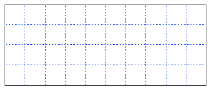 Description: Surfaces équivalentes Auteur: Yann Langlais Source: Création personnelle Site